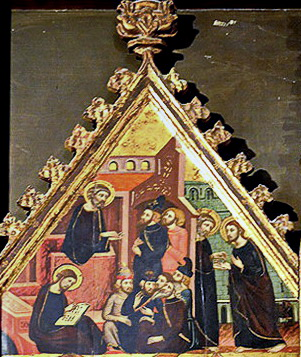 Retaule de Sant Marc i Sant Anià, obra d'Arnau Bassa (1346). Actualment a la Seu de Manresa. Taula de la conversió de Sant Marc per part de Sant Pere, al pis superior del carrer esquerre